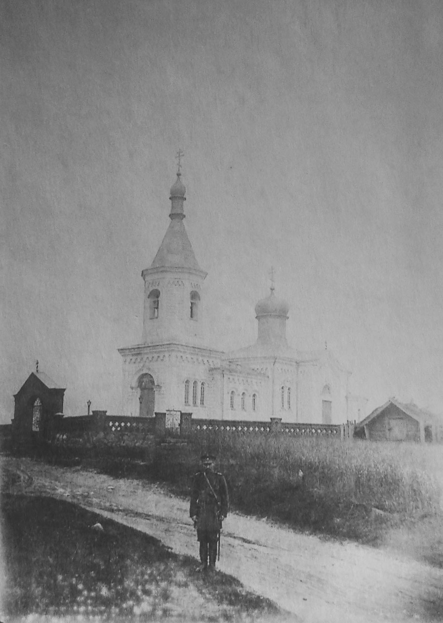 Беларуская (тарашкевіца): Язна (Jazna). Царква-мураўёўка